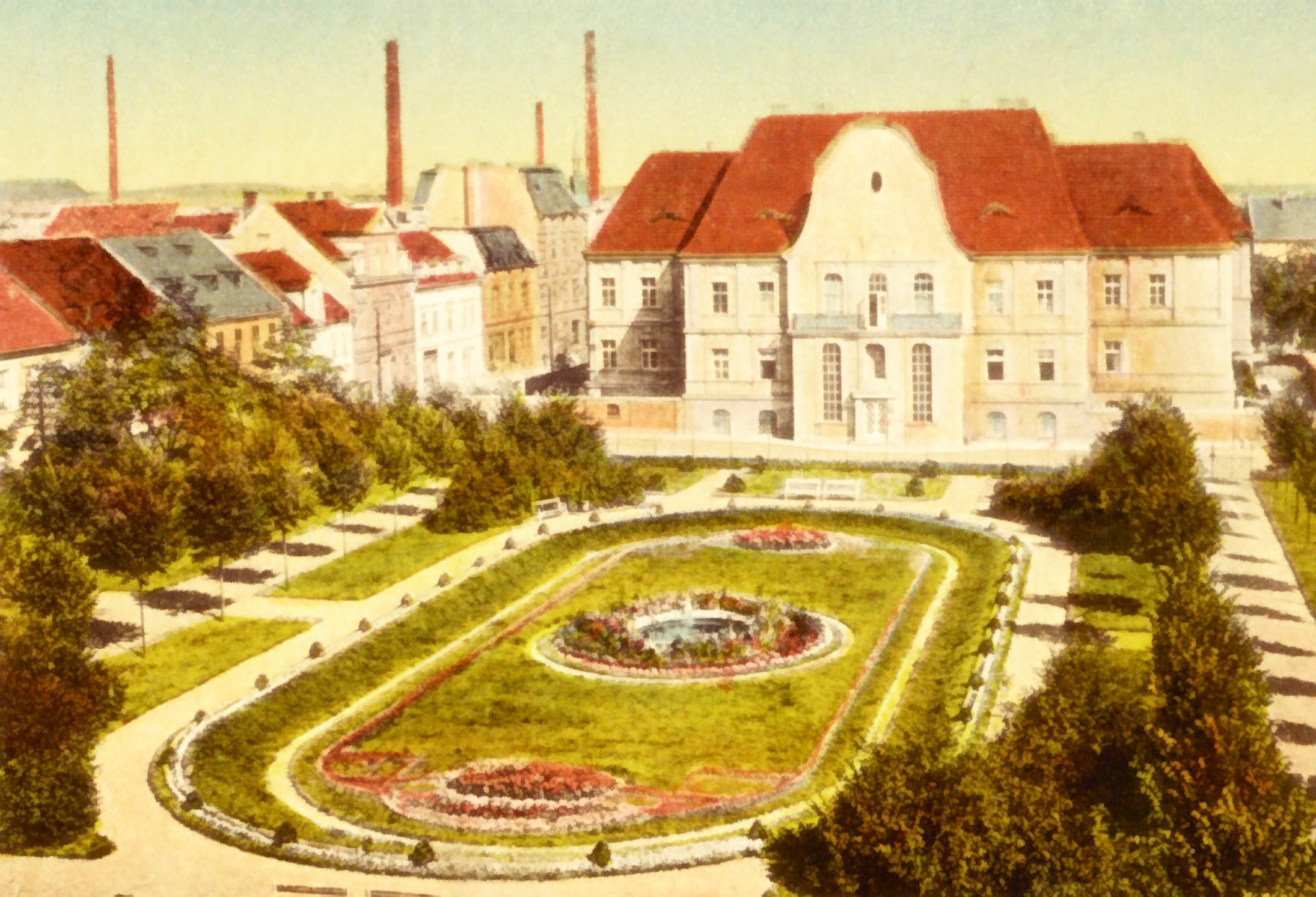 Stará pohlednice - Chomutov, Chudobinec císařovny Alžběty